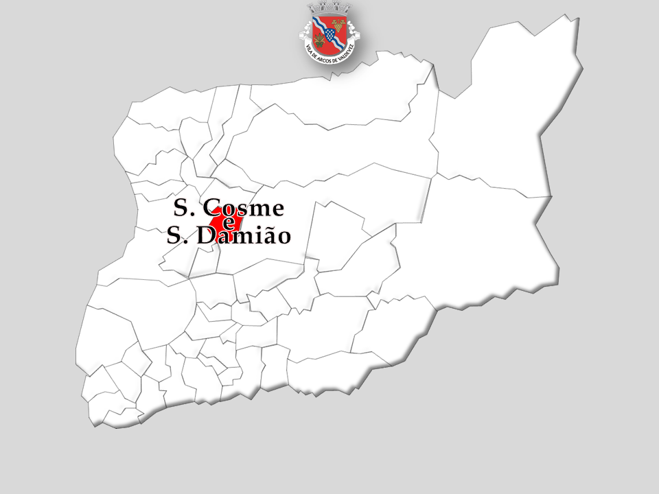 Censos 1864/2011